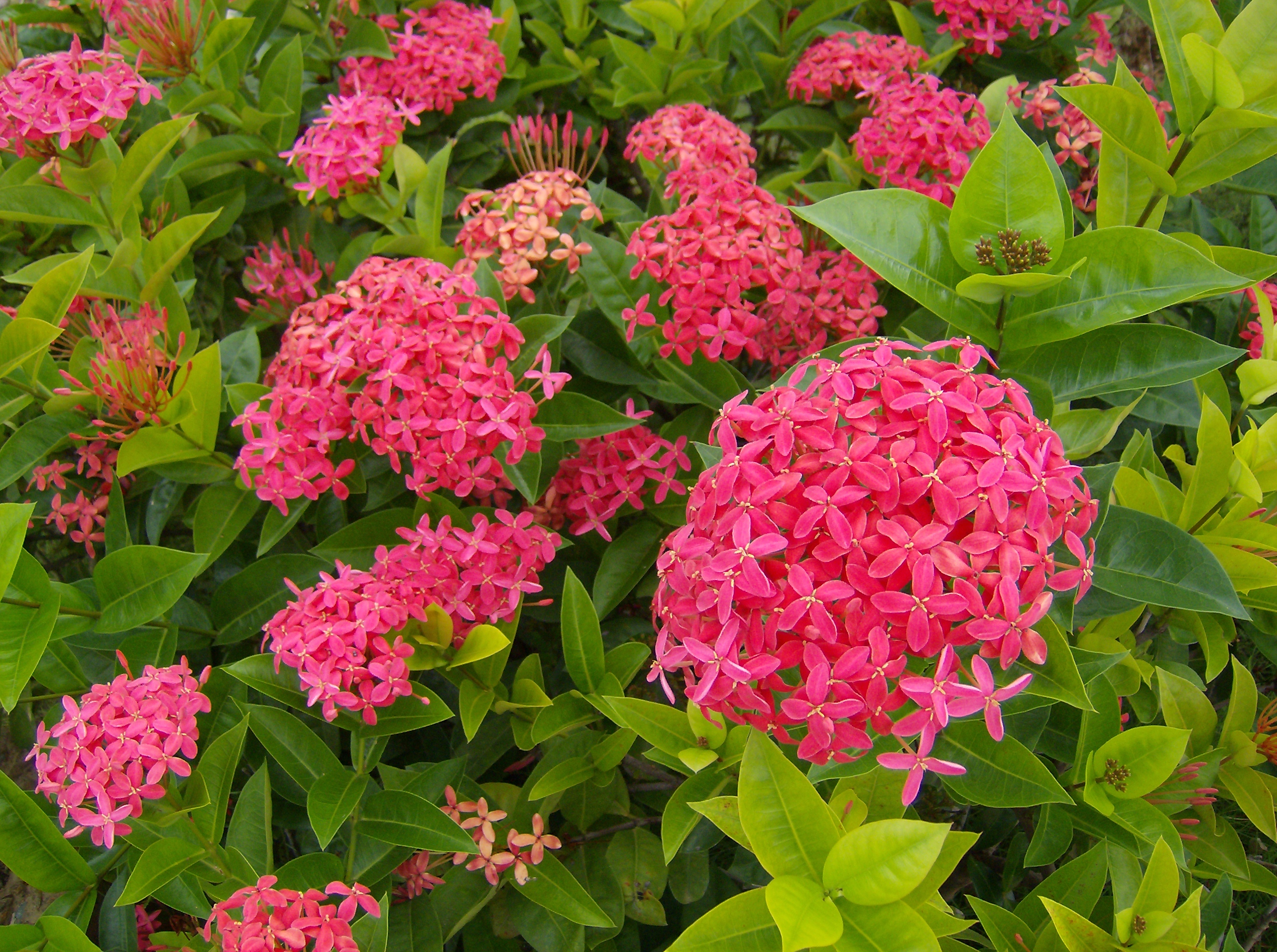 Ixora. La ixora es un género de plantas con 825 especies, pertenecientes a la familia de las Rubiáceas que florece todo el año. También se conoce como cruz de Malta, coralillo o Santa Rita.